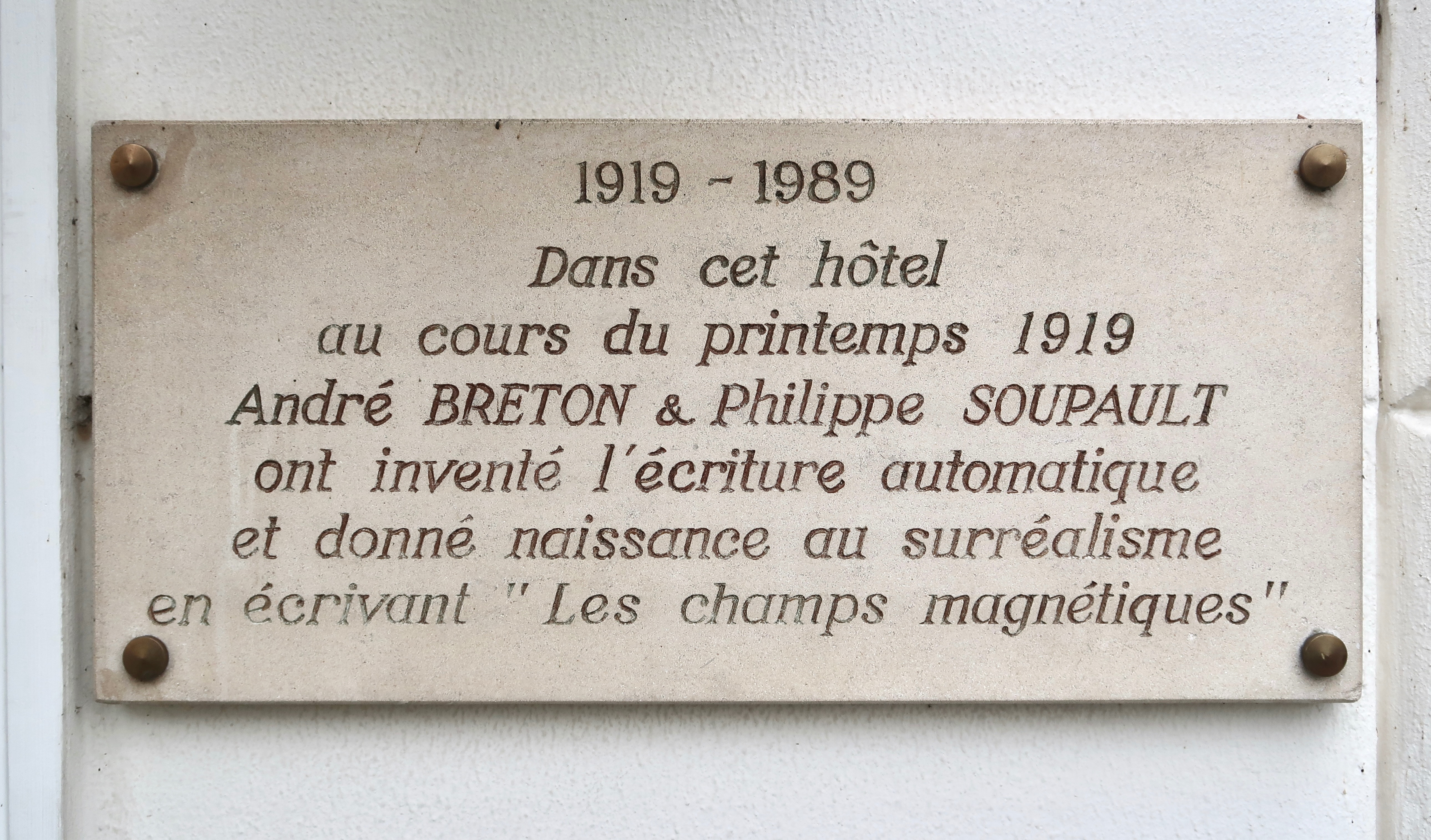 Plaque en hommage à André Breton et Philippe Soupault, hôtel des Grands hommes, 17 place du Panthéon (Paris, 5e).